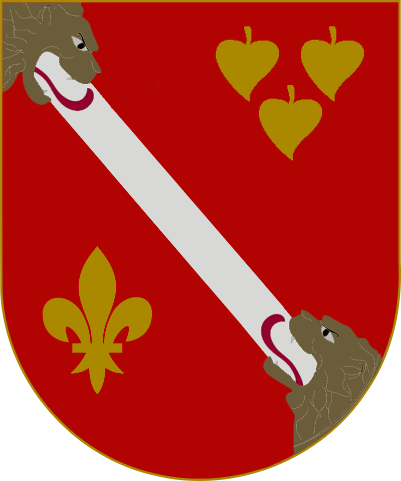 Escudo familia Hurtado PARLA (Esta formado por un campo de gules donde se representa una división por una banda blanca engolada de dragantes, en la parte superior derecha se encuentran 3 panelas de oro y en la parte inferior izquierda una flor de lis de oro)